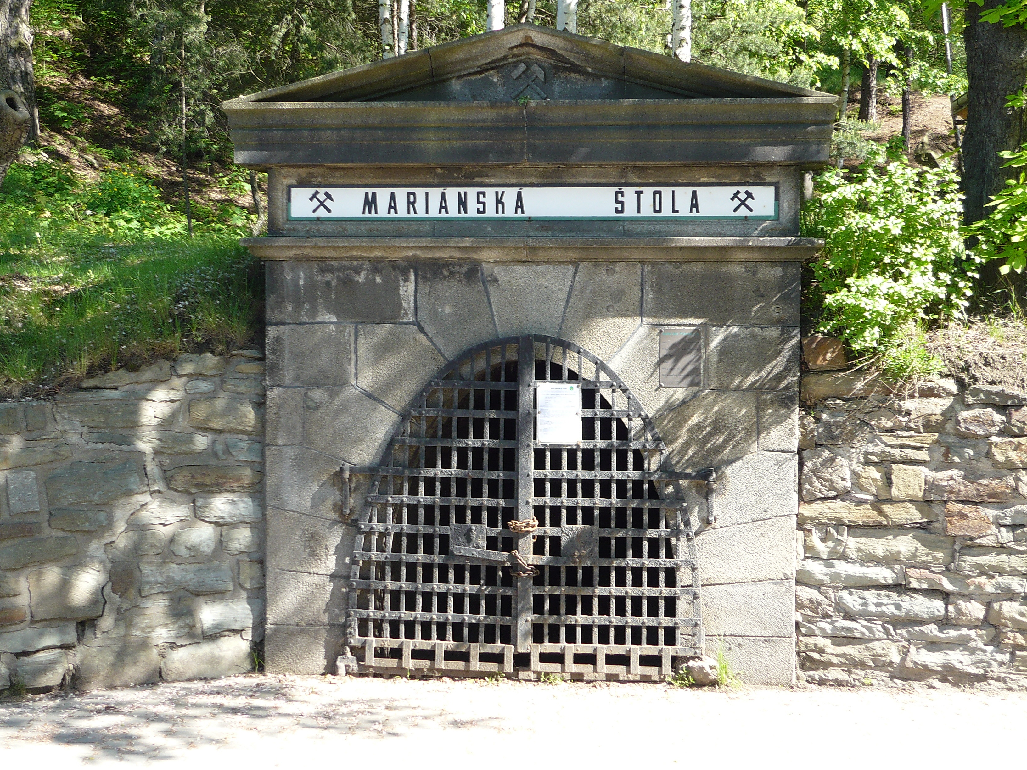 Důl Marie (ústí)